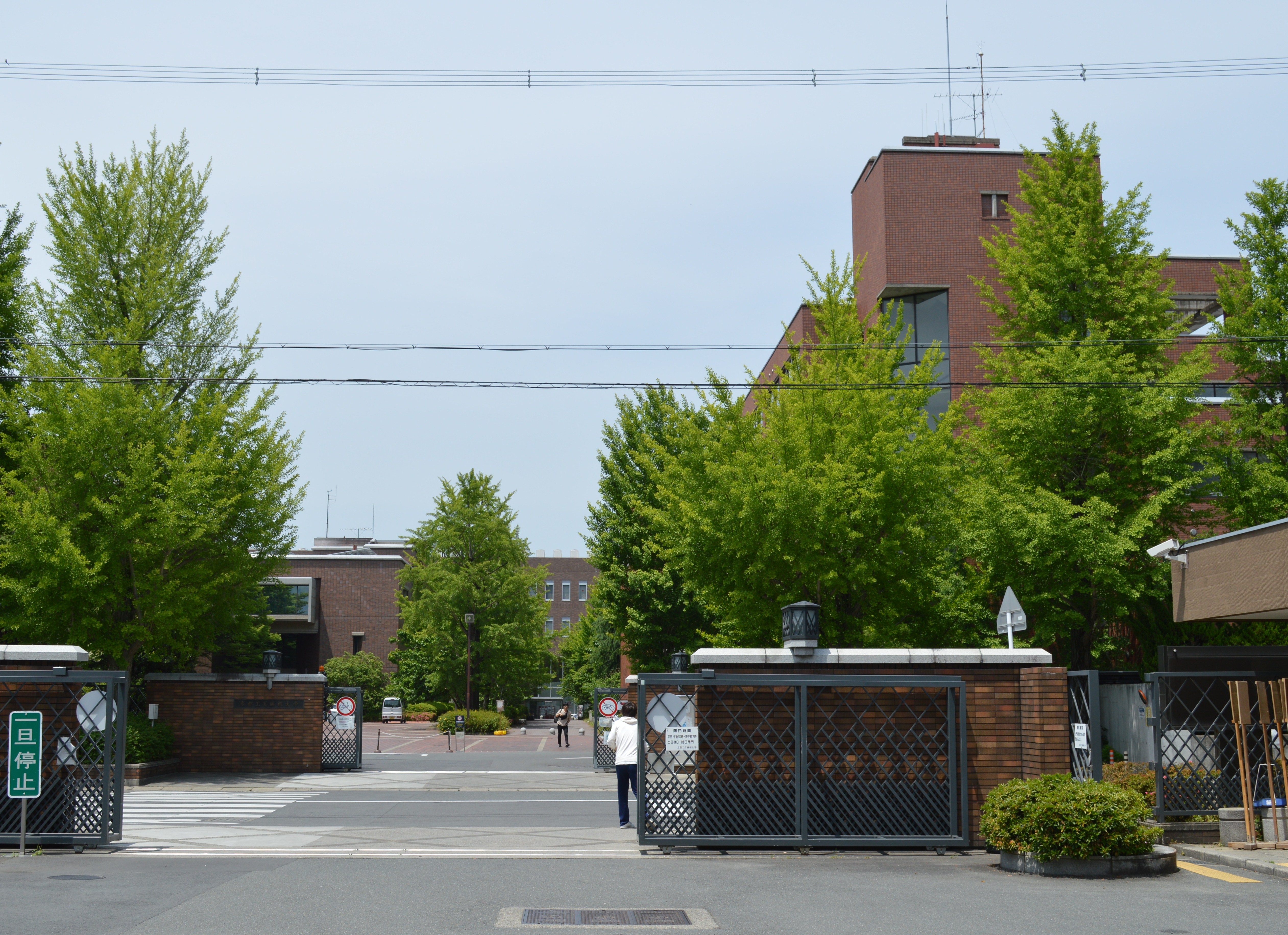 京都市左京区松ヶ崎 京都工芸繊維大学松ヶ崎キャンパス 東部構内入口付近から見た西部構内（中央東門・中央西門）